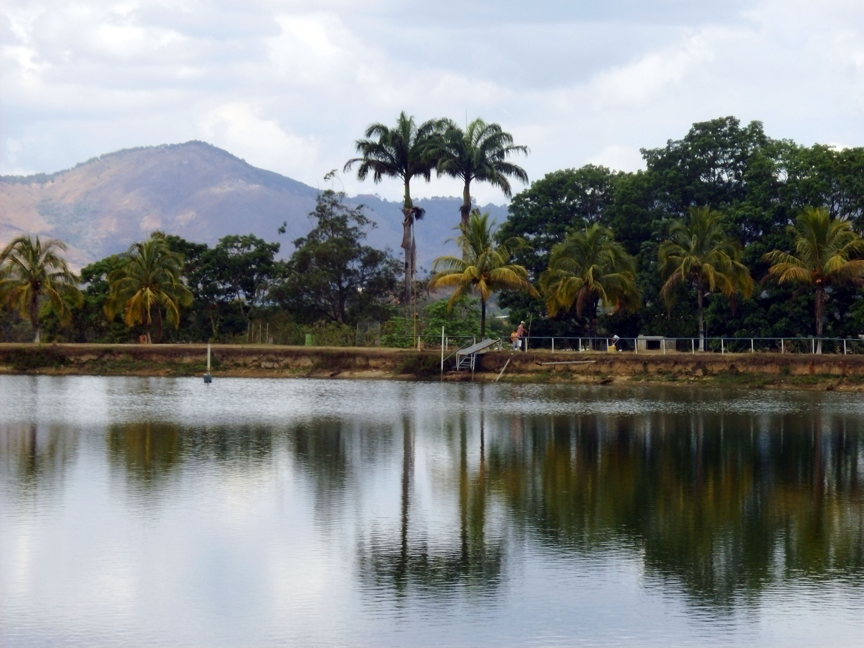 Lago La Esperanza Bejuma Edo. Carabobo